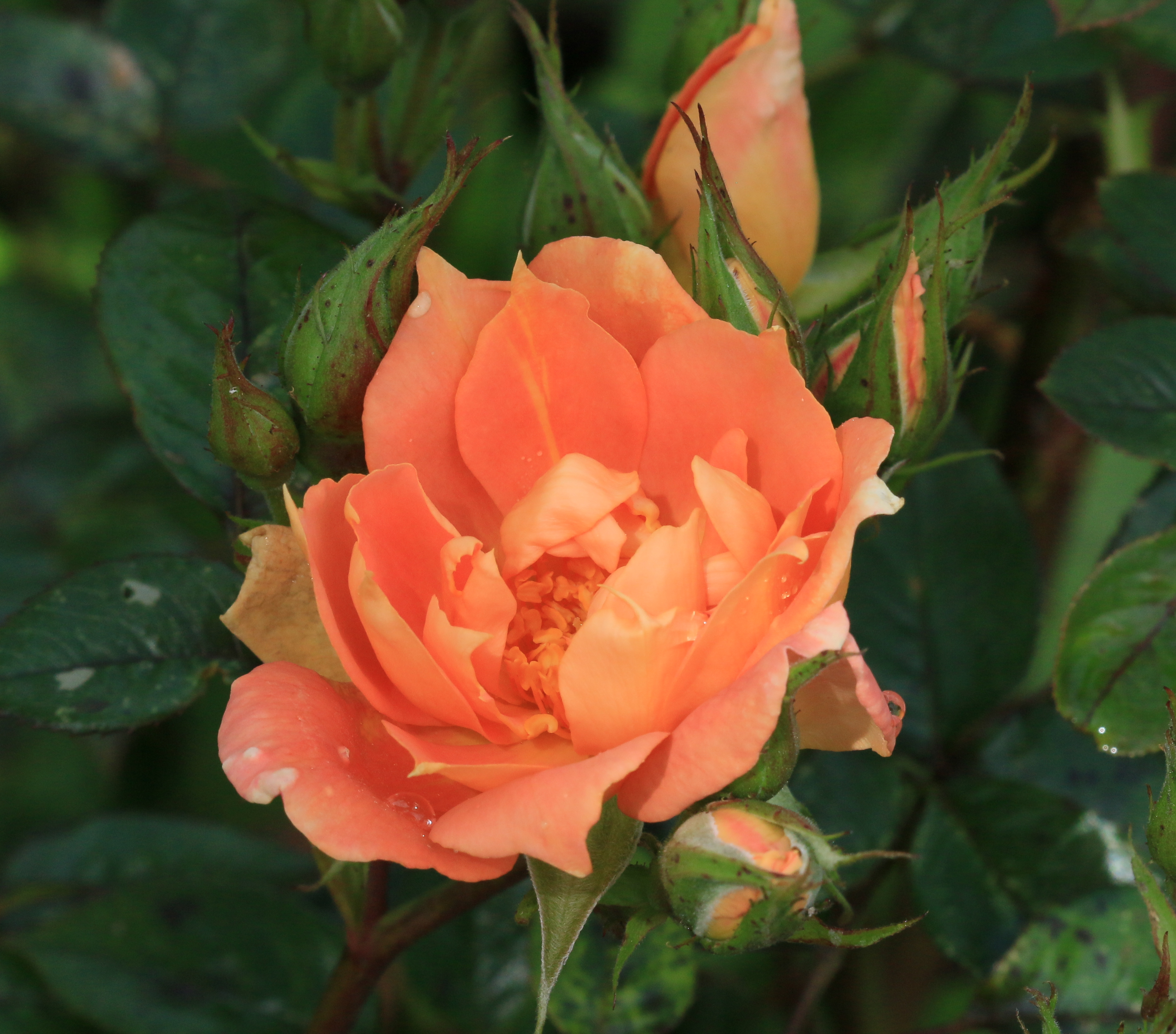 Garden safari